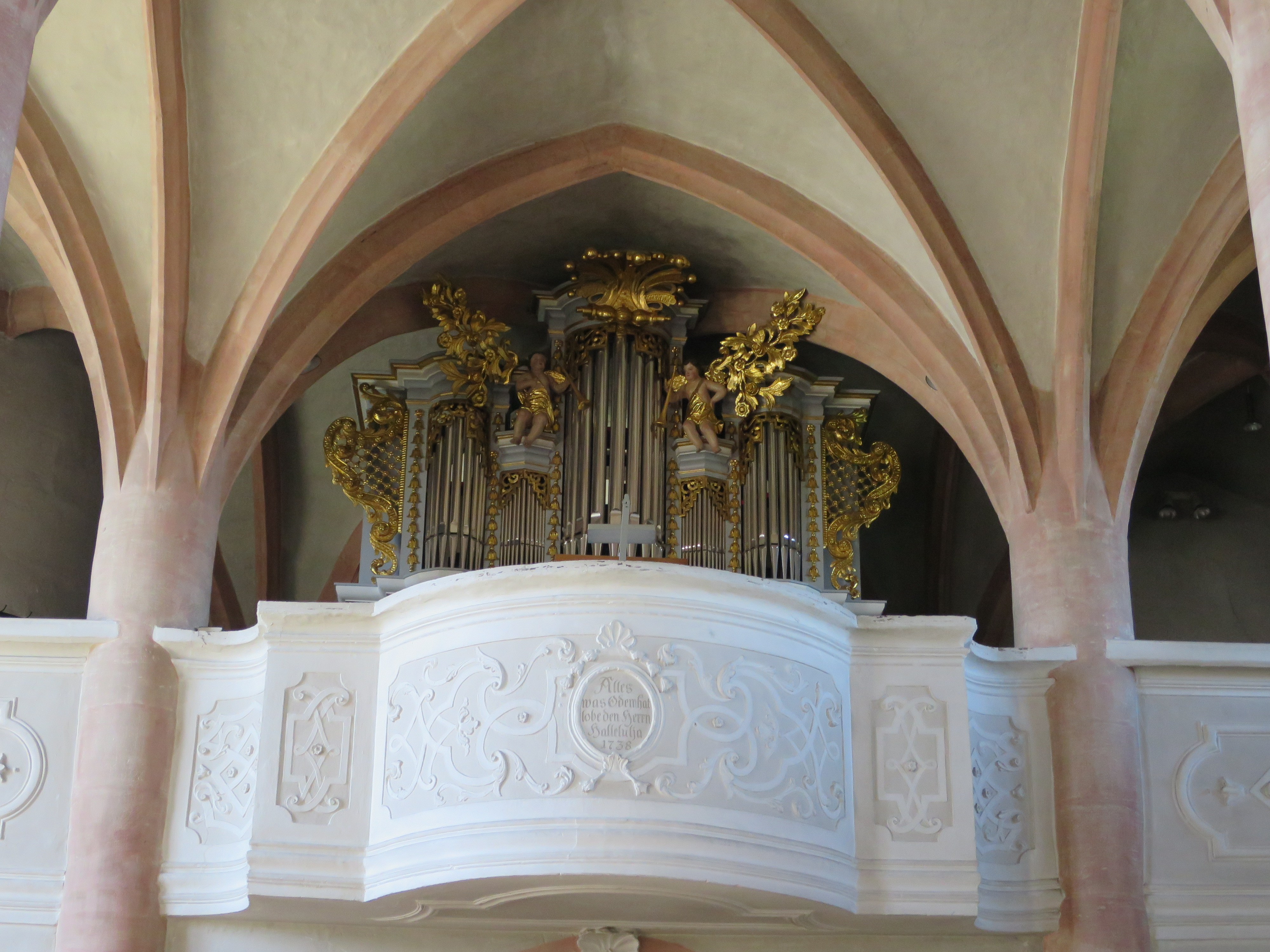 Orgel